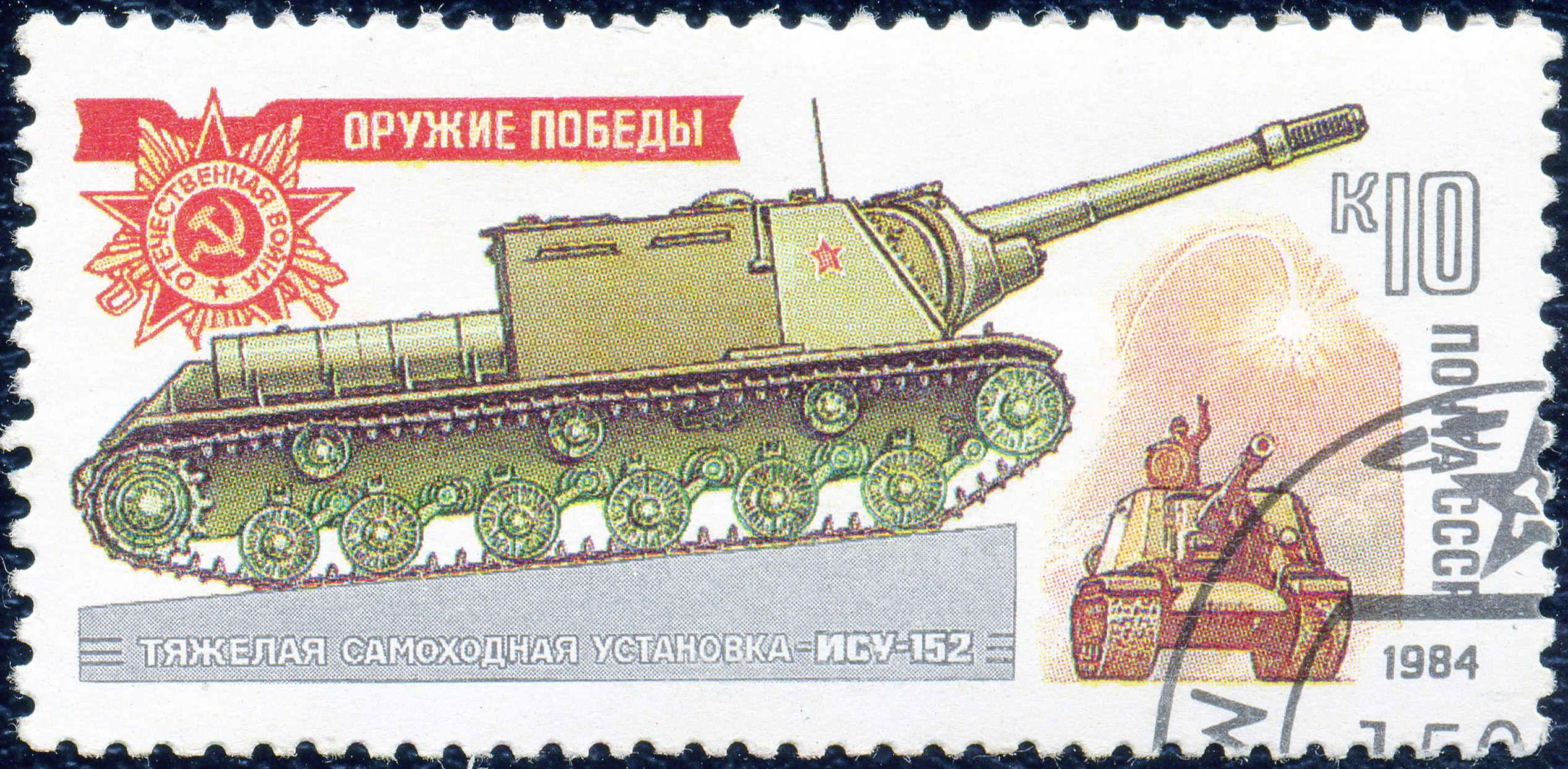 Почтовая марка СССР. 1984. Ису-152